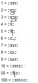 Numbrid jaava kirjas